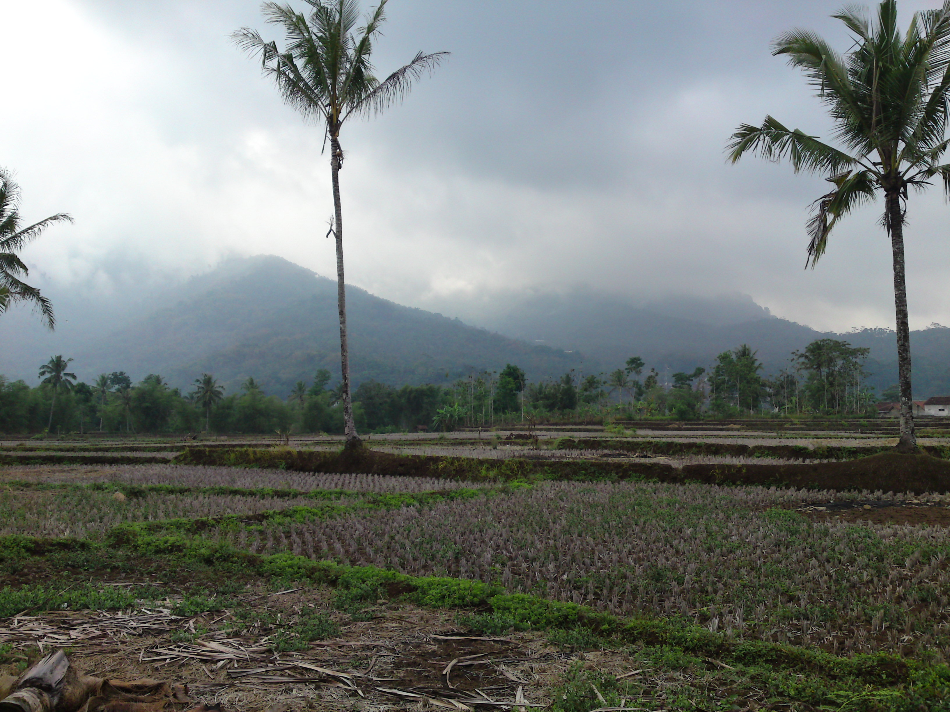 Tanjungmekar, Jamanis, Tasikmalaya, West Java, Indonesia